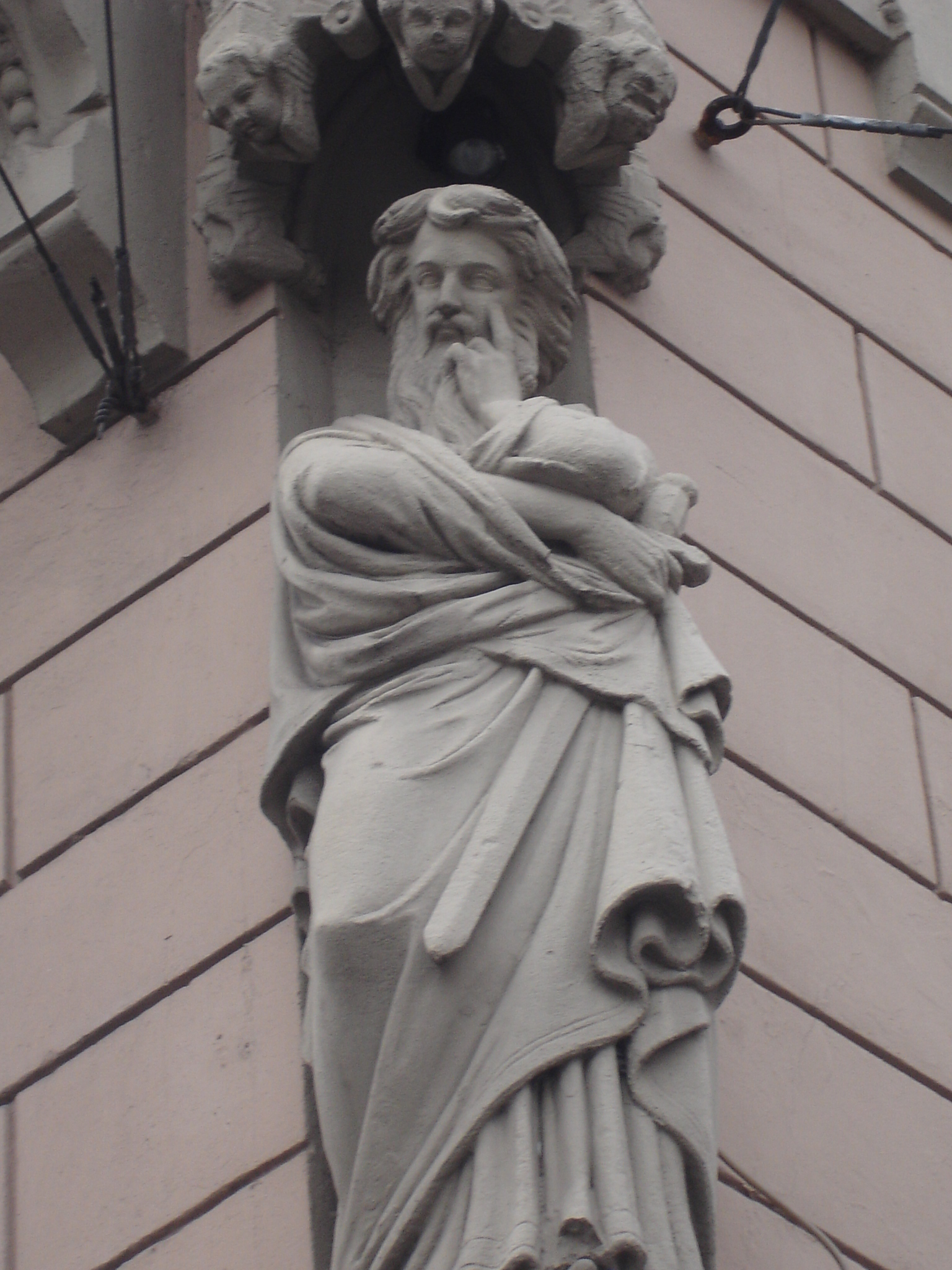 Lyon quai R Rolland/place Fousseret : l'apôtre Paul pensif